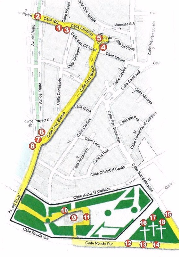 Recorrido de La Pasión de Motilla